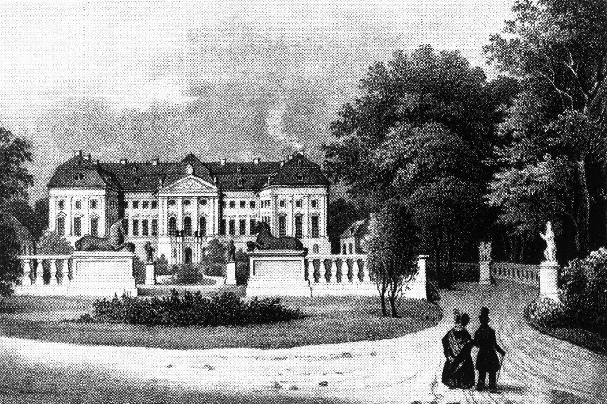 Schloss Joachimstein (Pałac Radomierzyce), gezeichnet von G. Täubert, Lithographie von C. W. Arlt, Dresden, um 1839